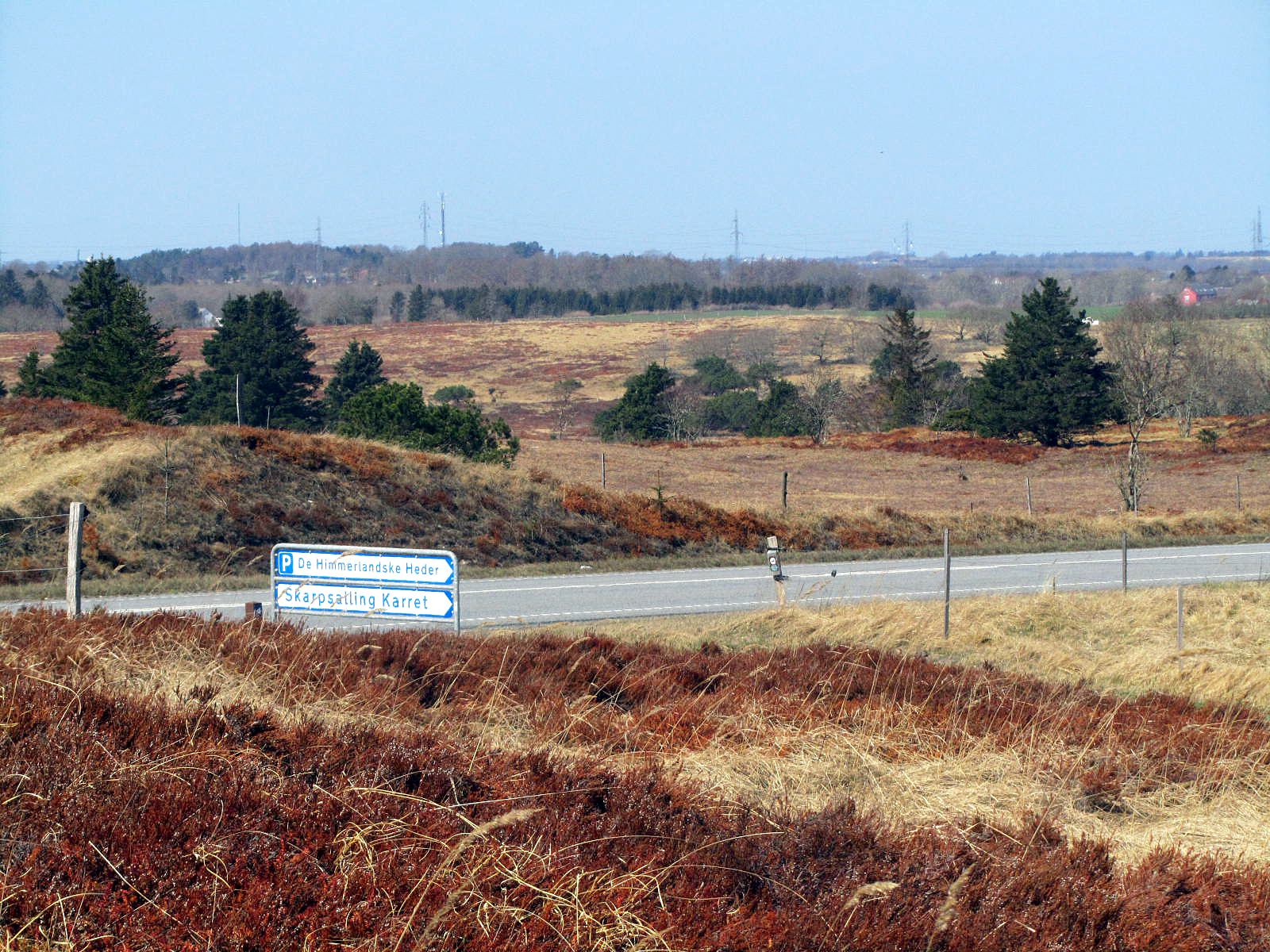 Himmerlandske Heder, Vindblæs Hede set mod nordvest